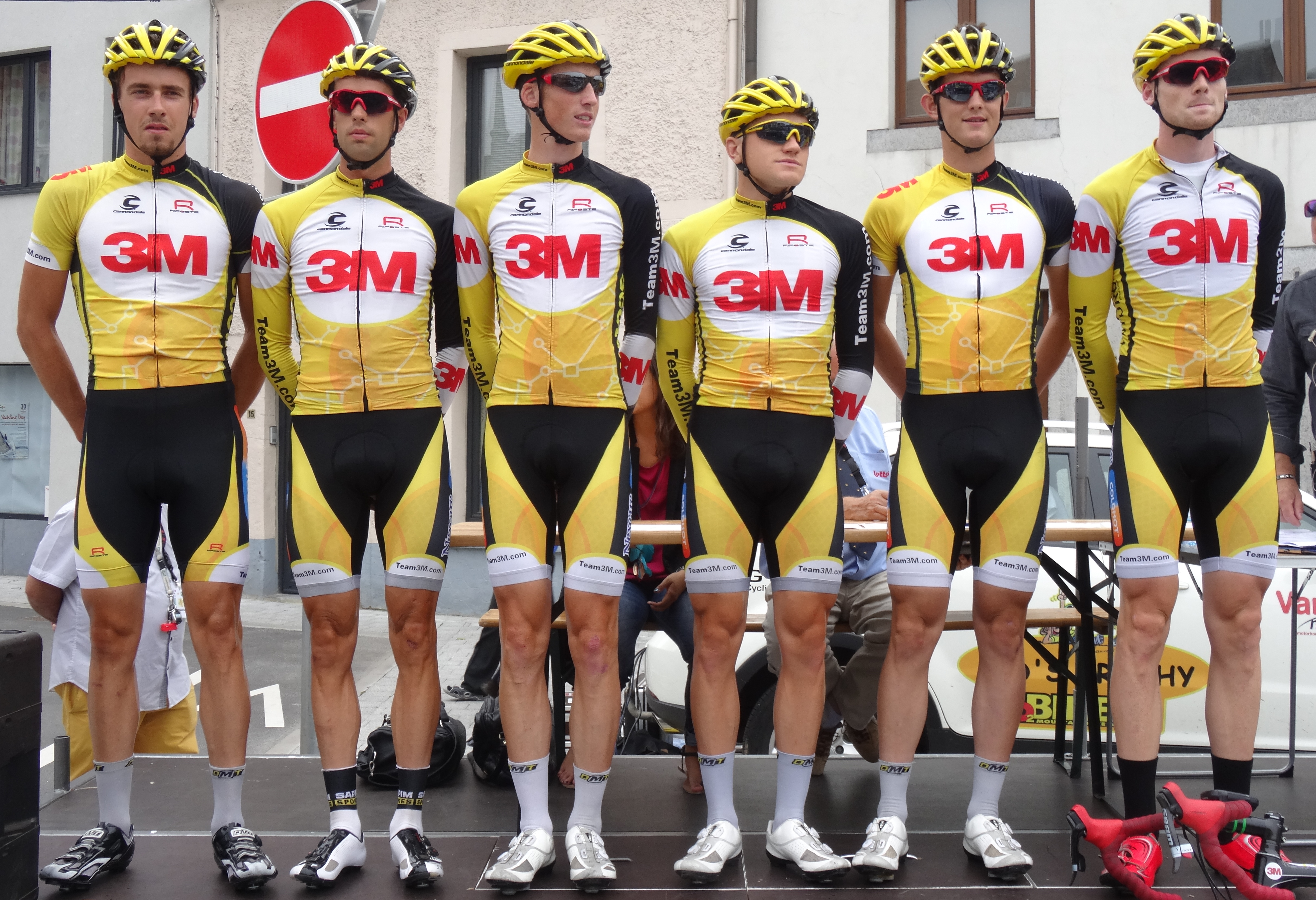 Reportage photographique réalisé le mercredi 6 août à l'occasion du départ de la première étape du Tour de la province de Namur 2014 à Jambes (Namur), Belgique.